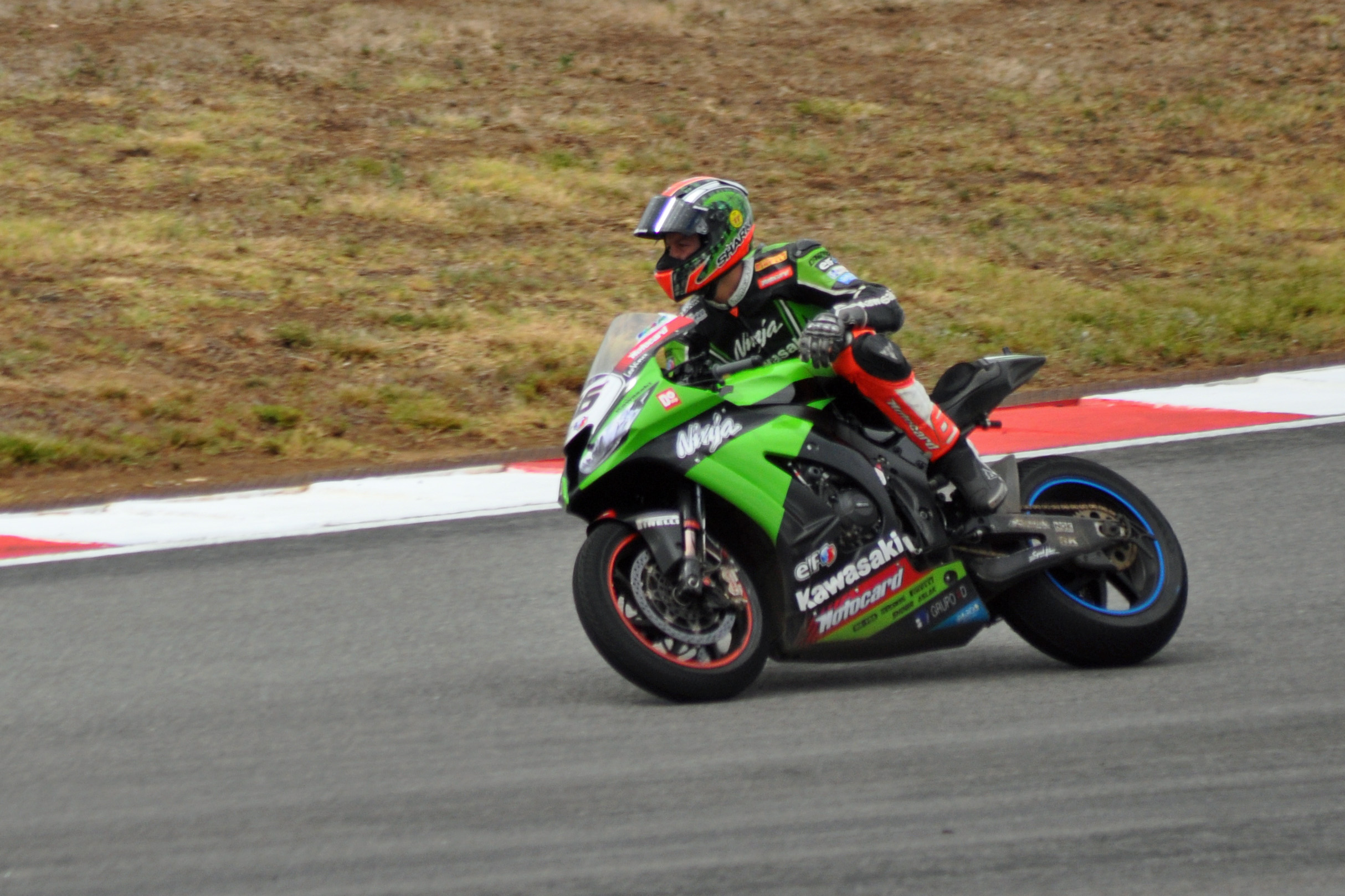 Autódromo Internacional do Algarve (2012-09-23), by Klugschnacker in Wikipedia (73) Tom Sykes (GBR) auf Kawasaki, auf der Ehrenrunde